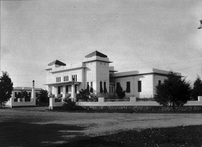 Foto. Paleis van de legercommandant.